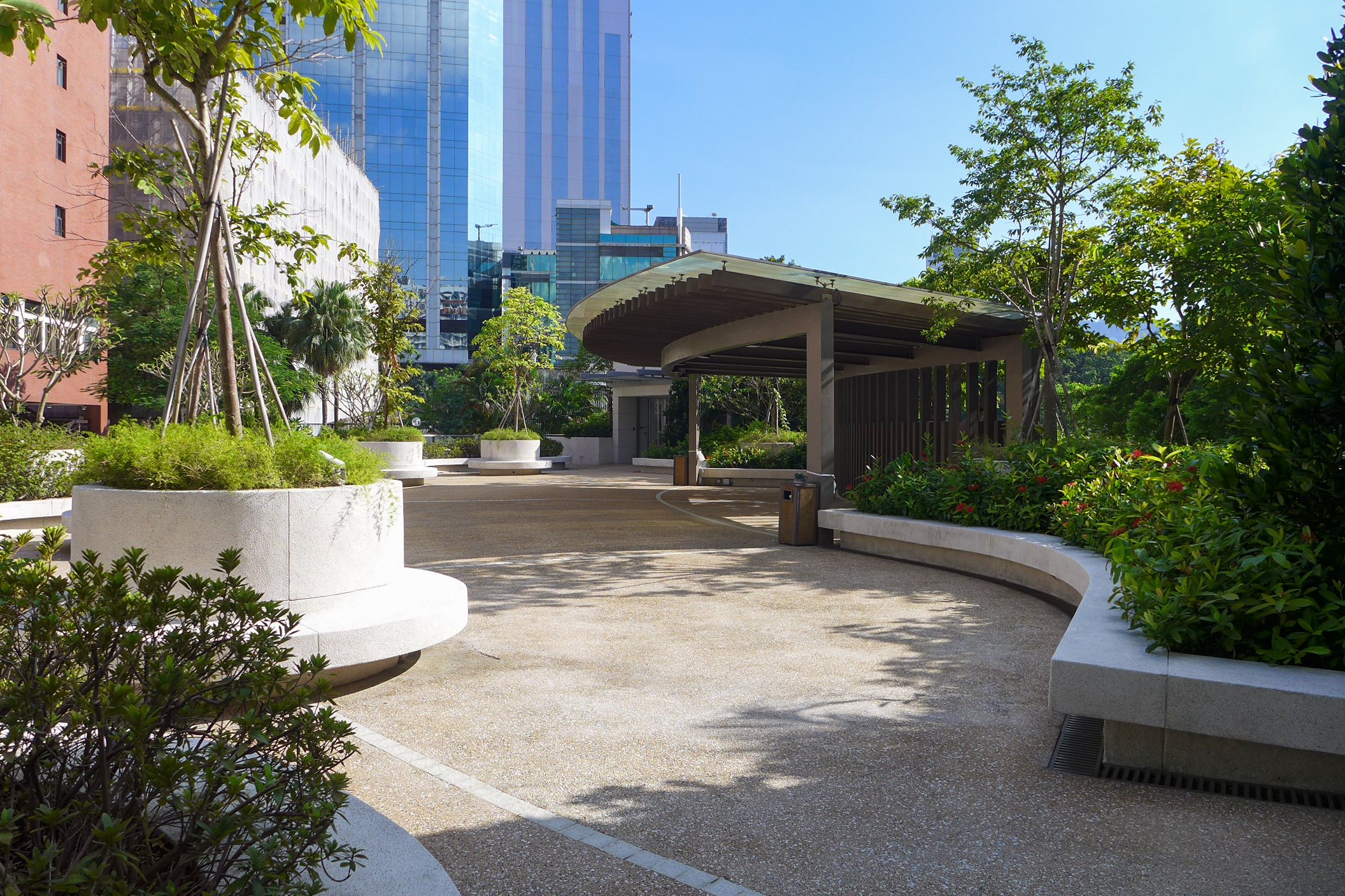 St Andrew's Church Seeds Garden